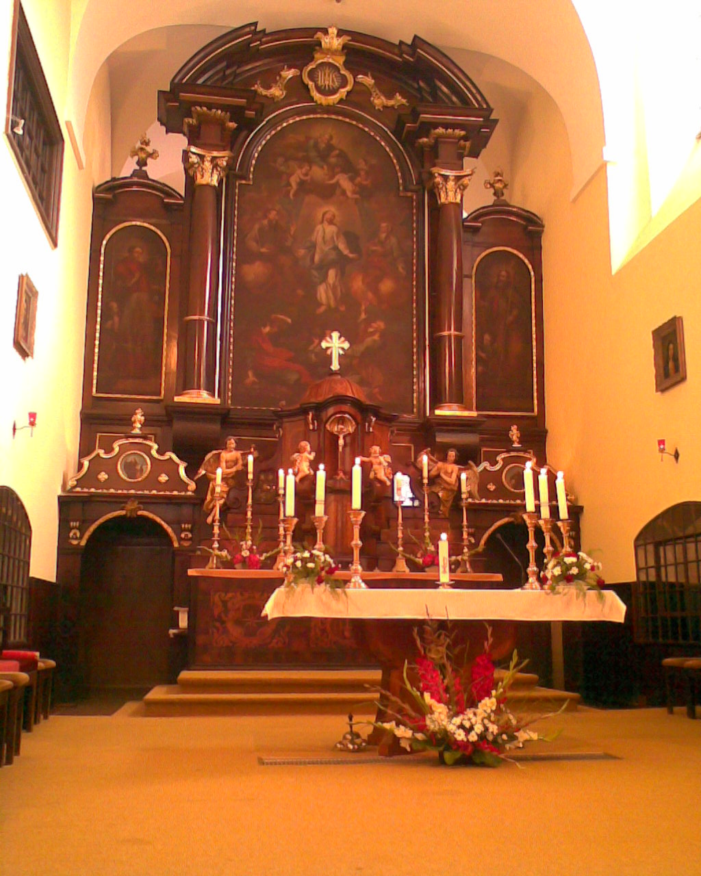 Oltář